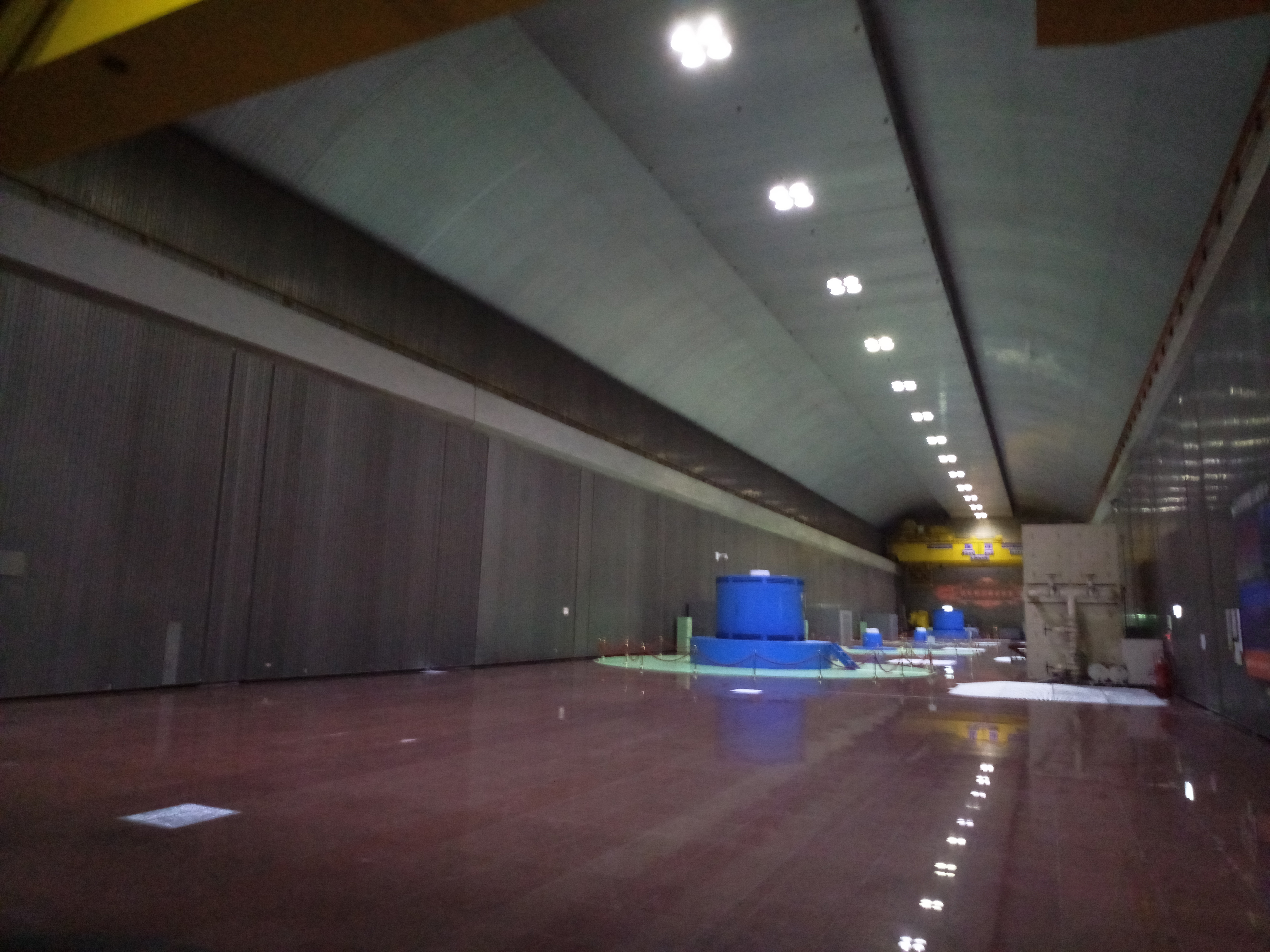 大觀發電廠二廠地下廠房內部